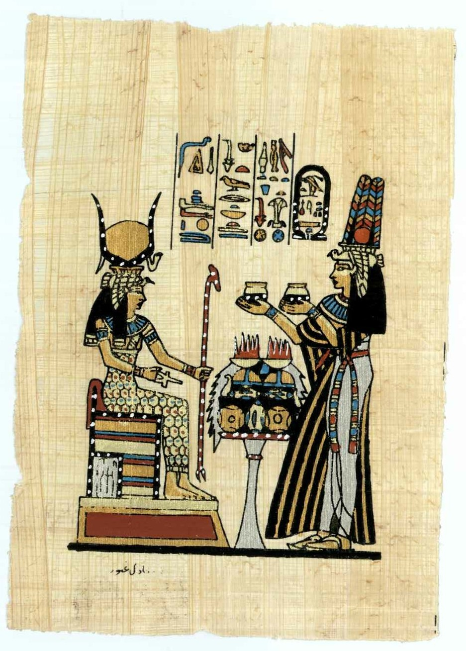 Papyrus Schrëftstëck